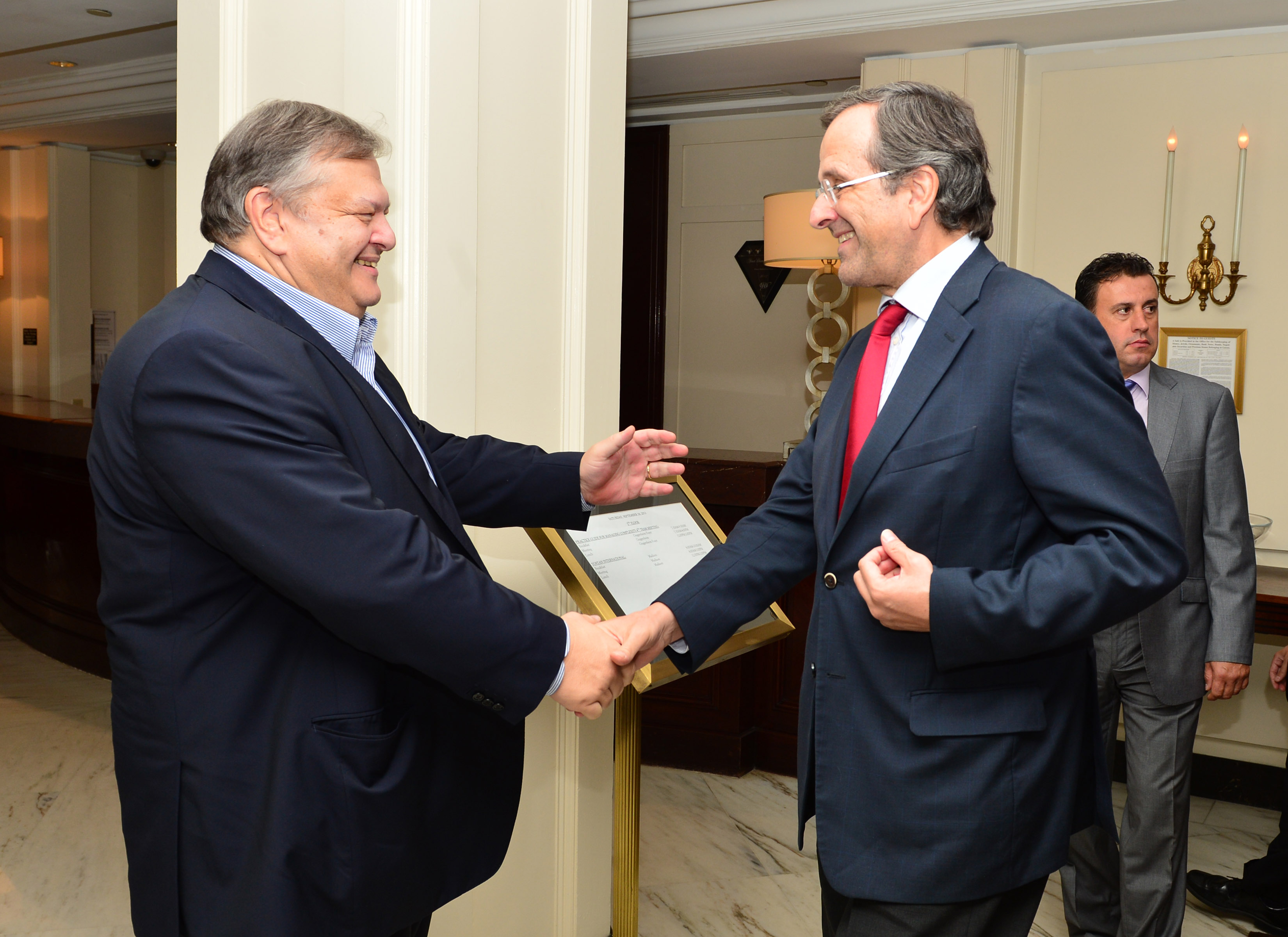 Συνάντηση Πρωθυπουργού Α. Σαμαρά και Αντιπροέδρου και ΥΠΕΞ Ευ. Βενιζέλου (Ν. Υόρκη, 29.09.13)